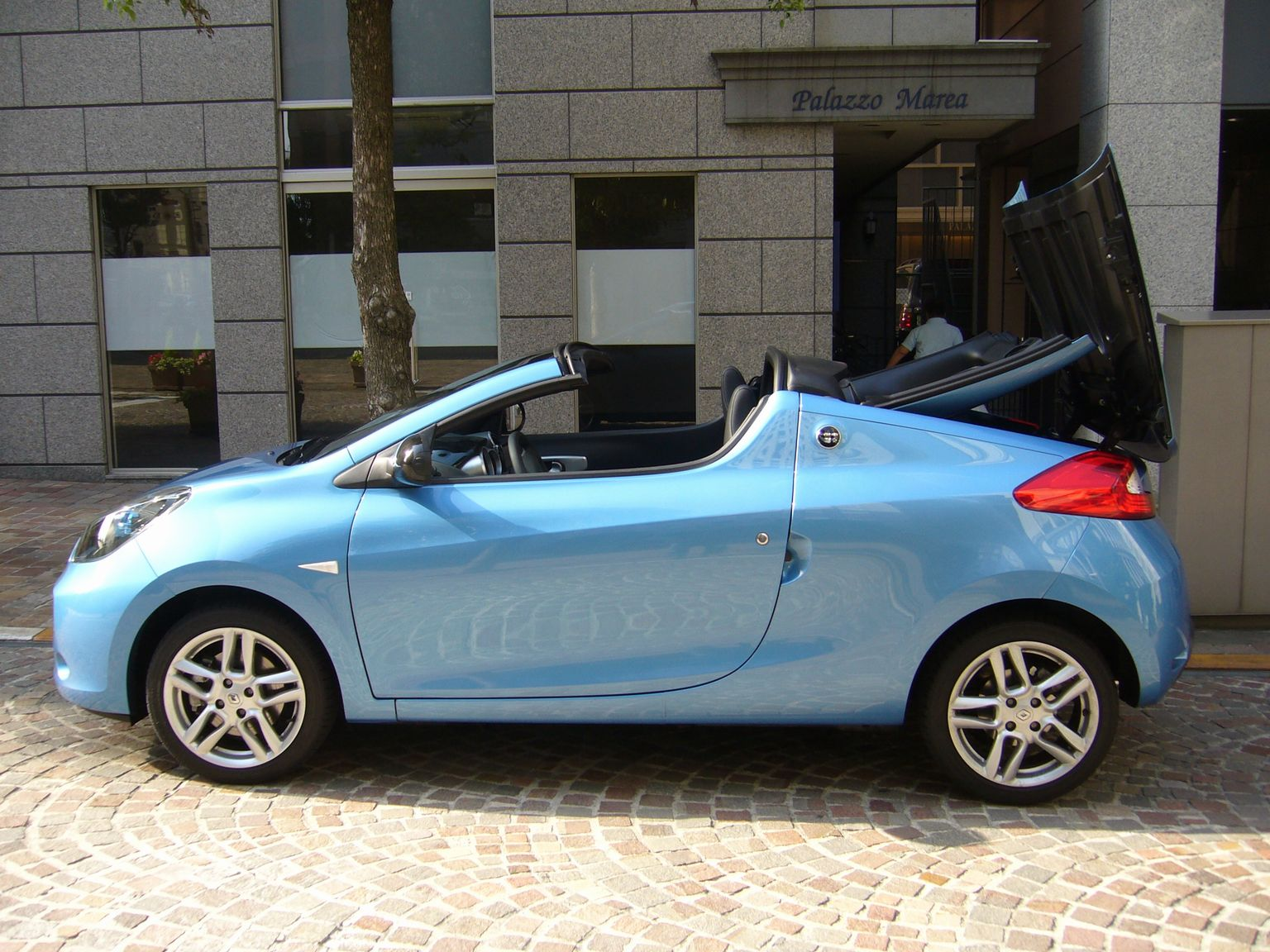 ルノー・ウインド